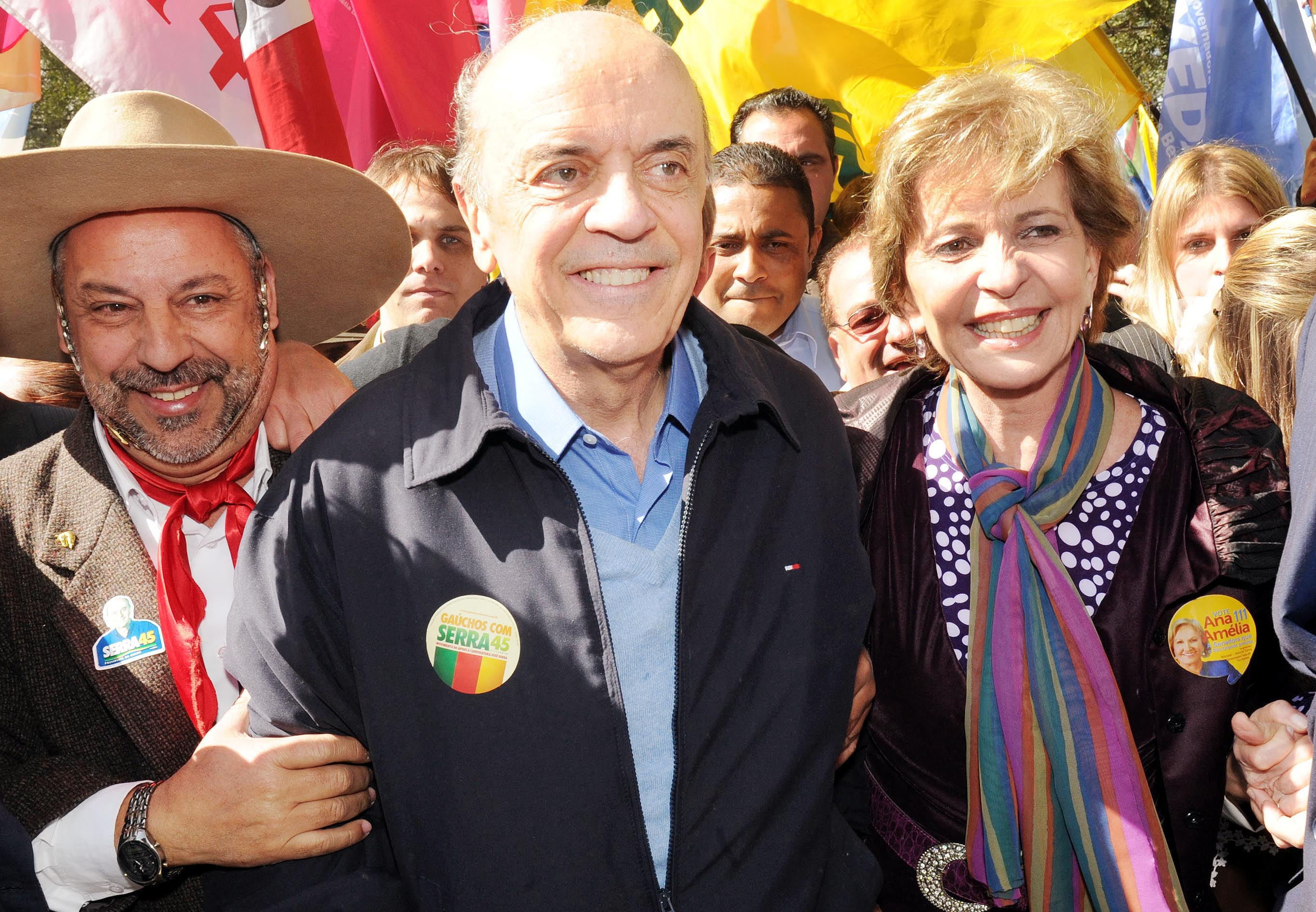 Durante encontro em Porto Alegre, José Serra, recebe o apoio de gaúchos de vários setores.